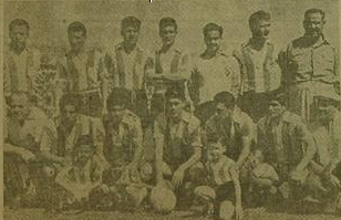 Equipo de Unión de Santa Fe que formo en en 1956